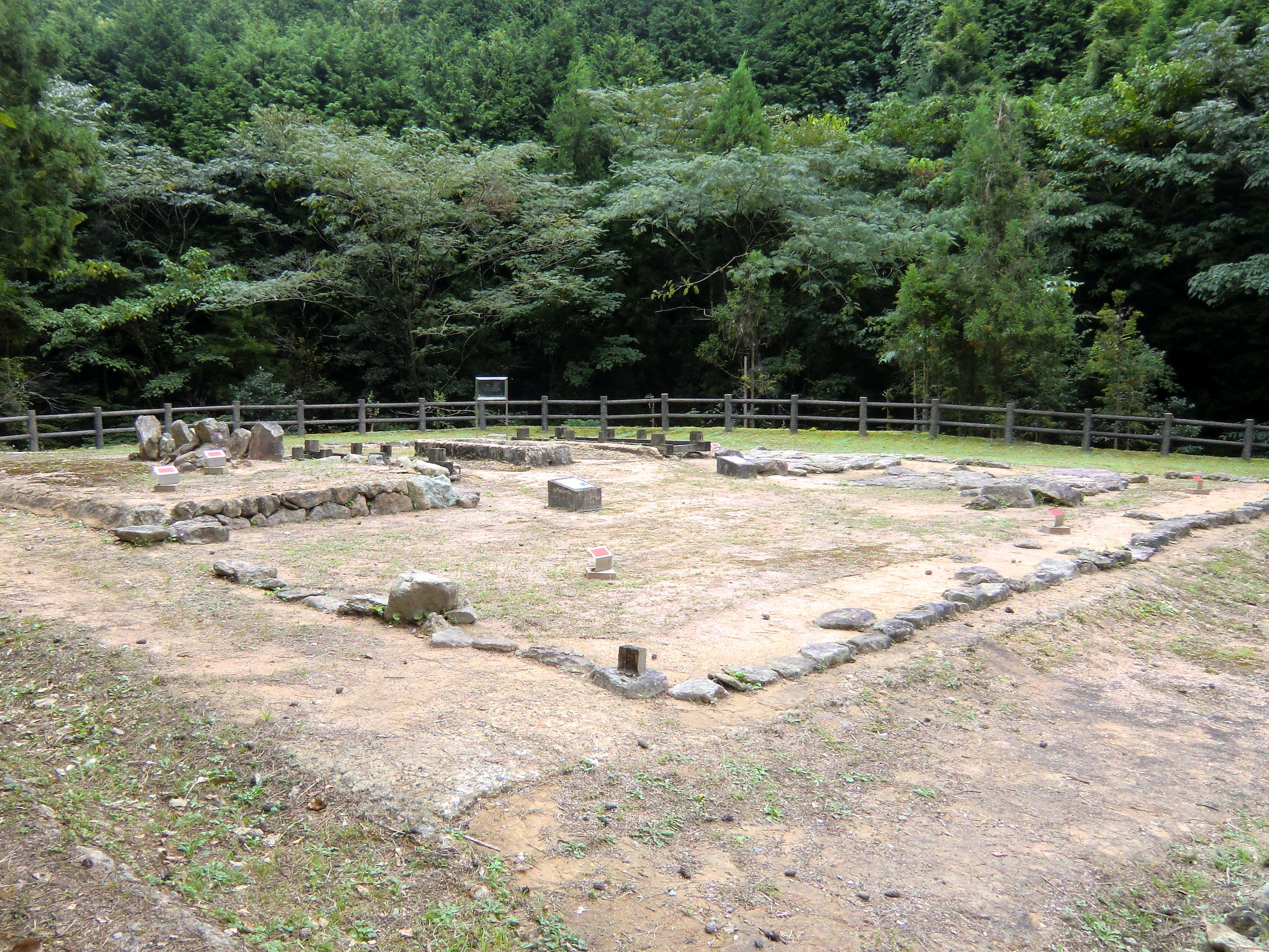 大板山たたら製鉄遺跡（萩市）の高殿跡。製鉄炉と天秤ふいごを備えた中核施設。